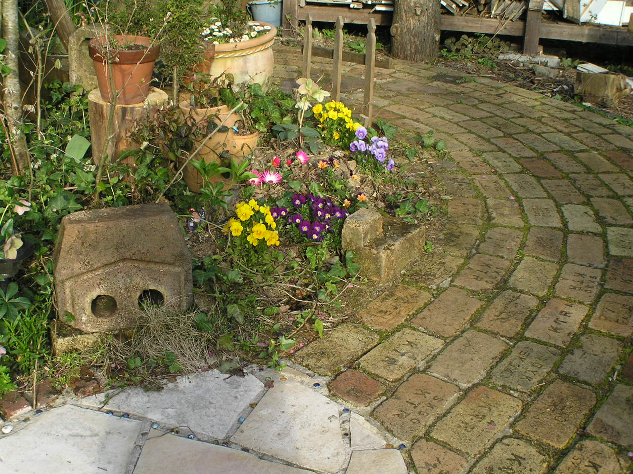 イングリッシュガーデン